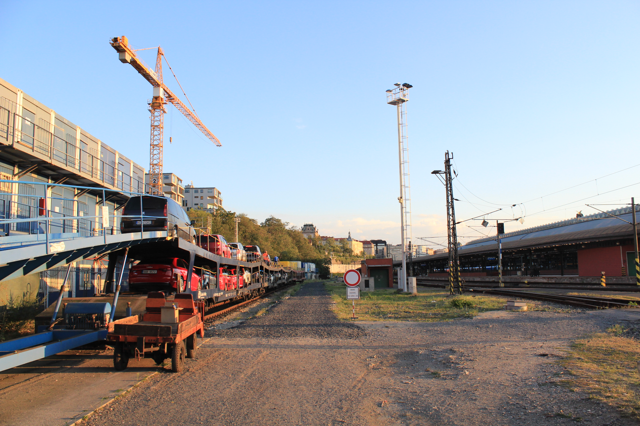 Praha hlavní nádraží autovlak 2